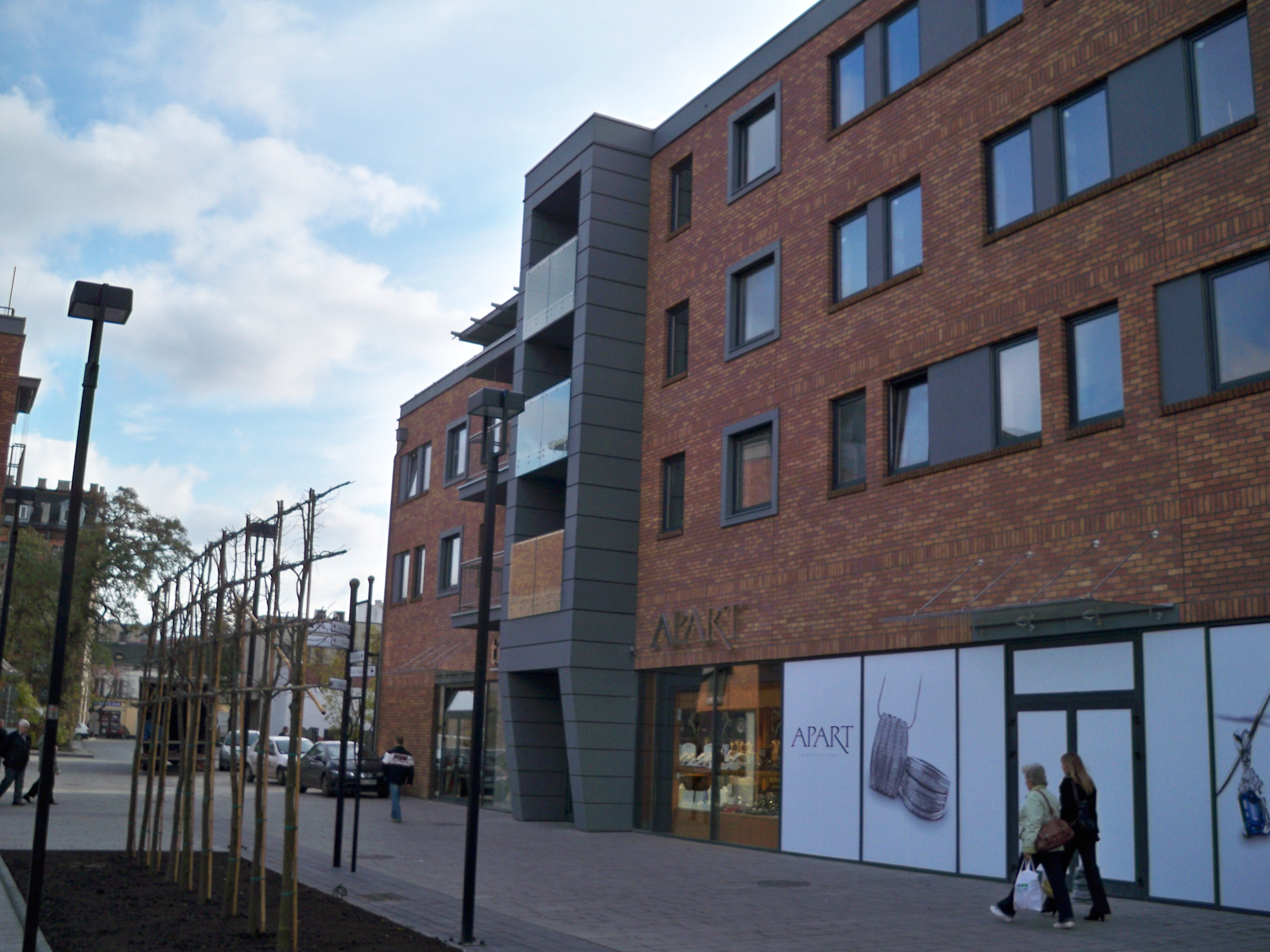 Wzorcownia Włocławek w 2009 r.